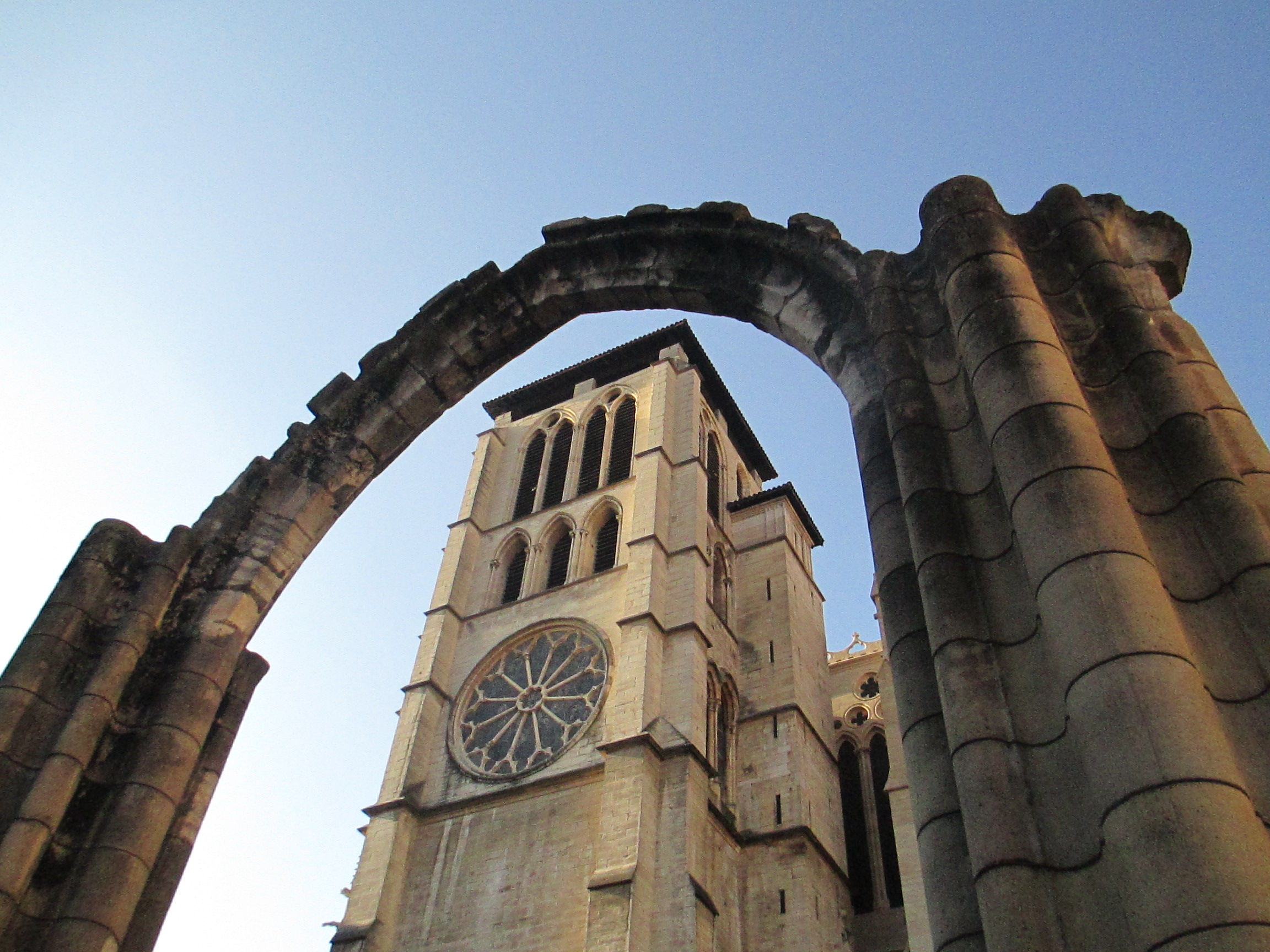 Tour Nord-Est de la primatiale Saint-Jean-le-Baptiste de Lyon vue à travers les vestiges de l'ancienne cathédrale Saint-Étienne. .